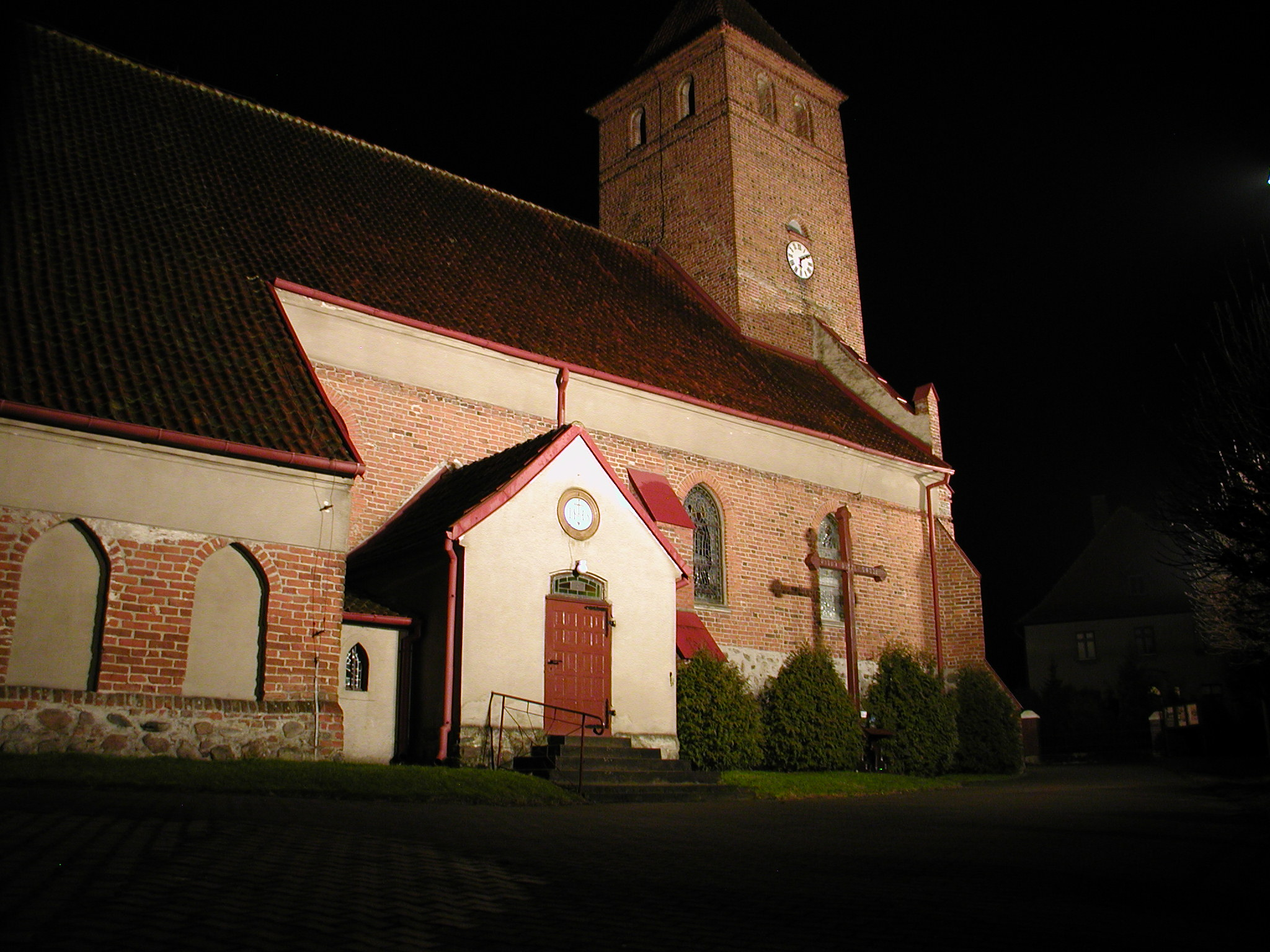 kościół parafialny pw. św. Marii Magdaleny wraz z wyposażeniem wnętrza Kurzętnik, Kurzętnik